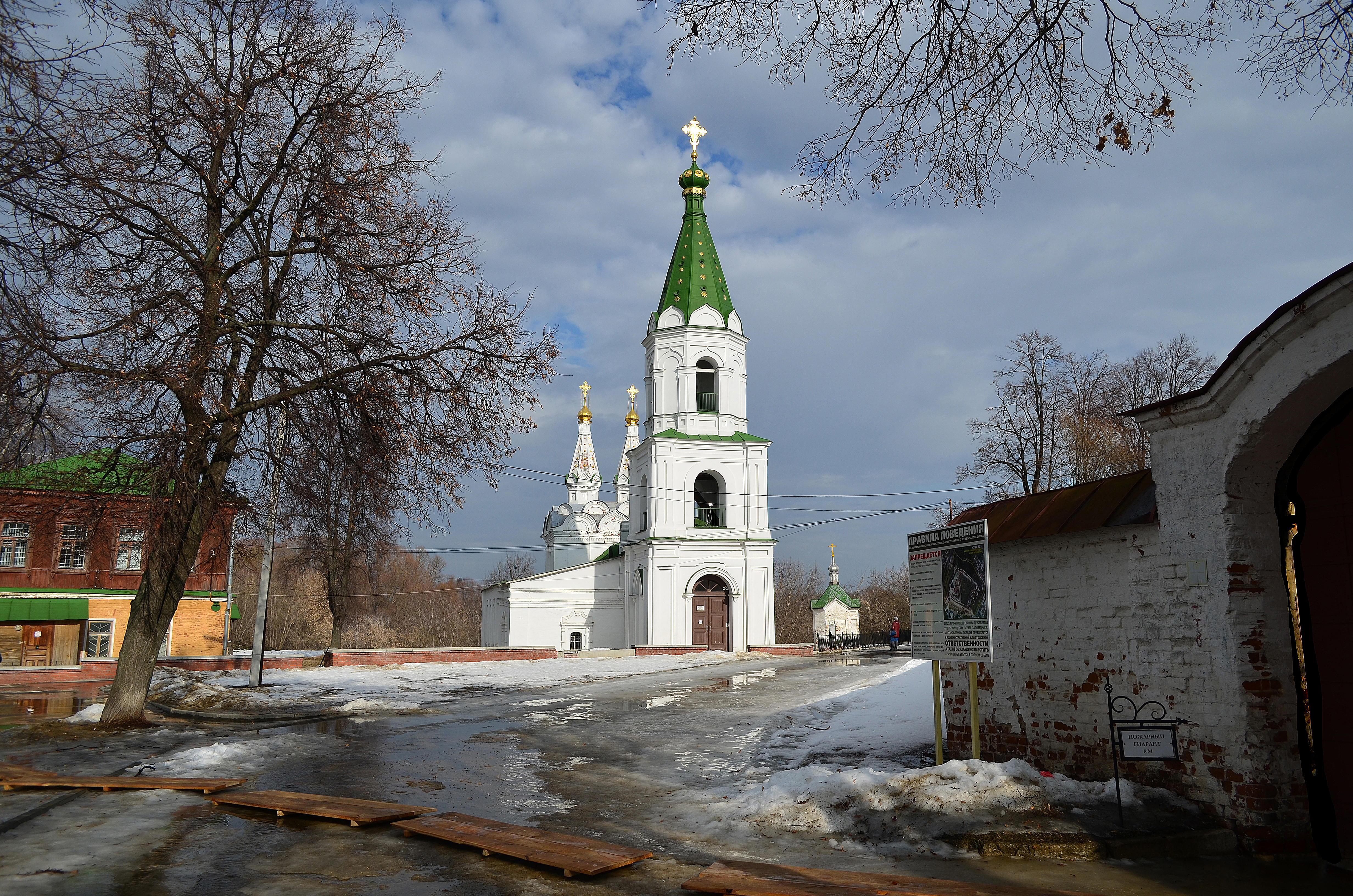 Рязань.Кремль.Церковь Св.Духа.1642.